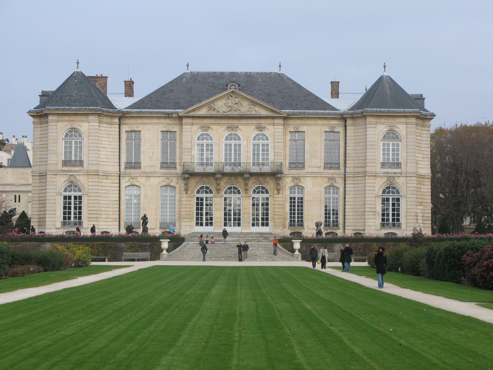 Rodin Museum, Paris